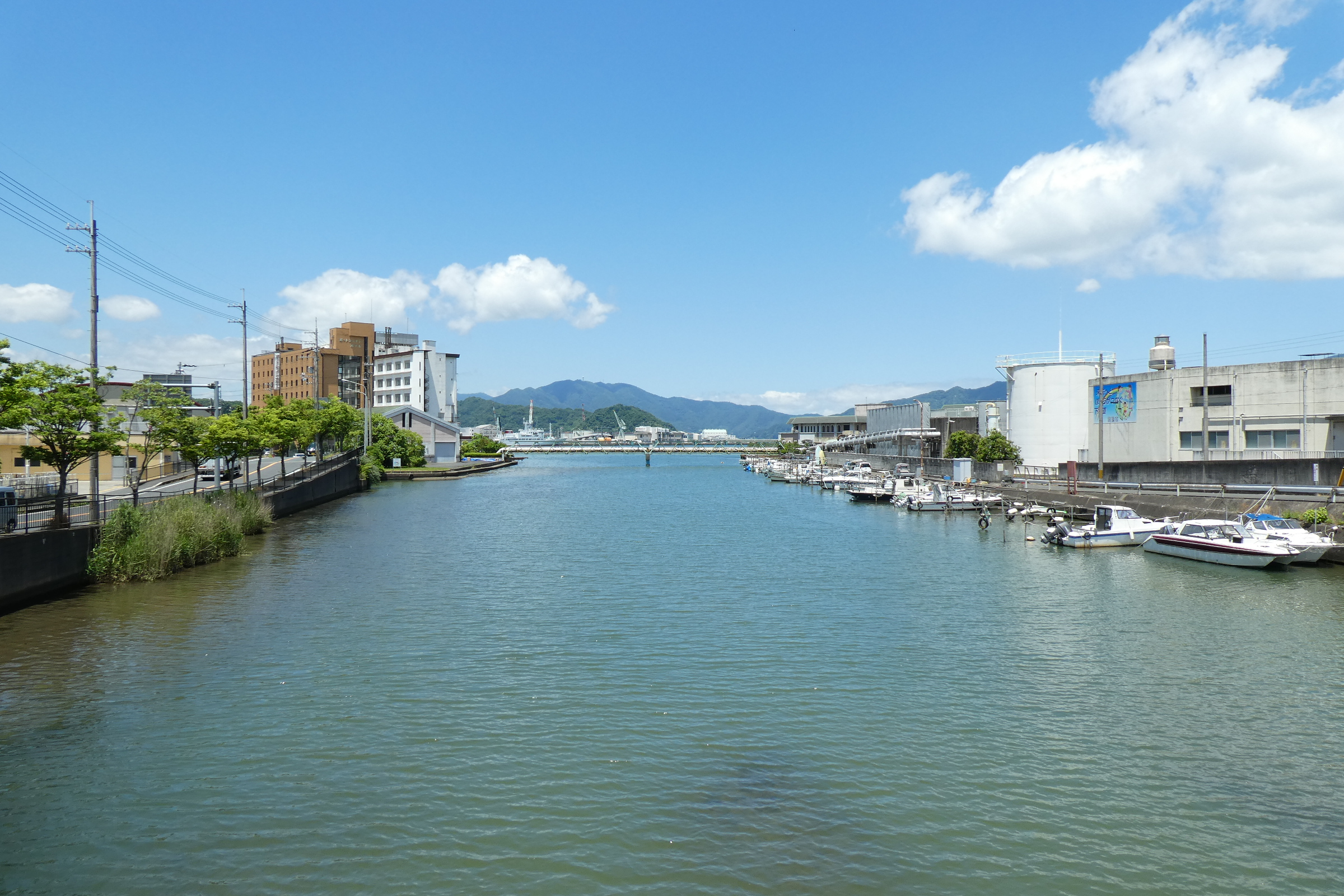 志楽川河口。京都府舞鶴市の松島橋より撮影。